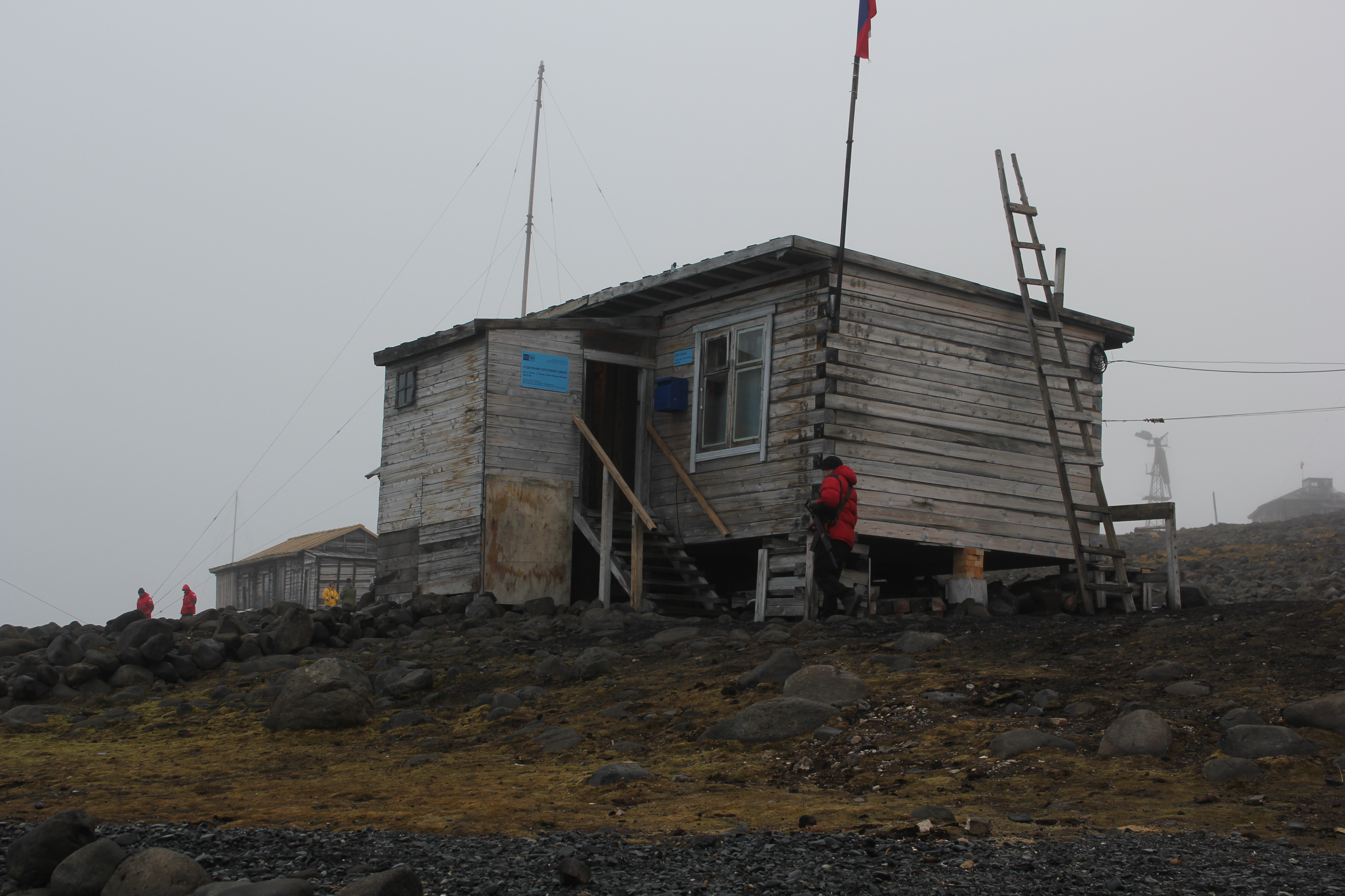 Комплексный заказник Земля Франца-Иосифа: Архангельск,Приморский район, Архангельская область. Почта 163110. This image is related to the protected area of Russia number 2930163